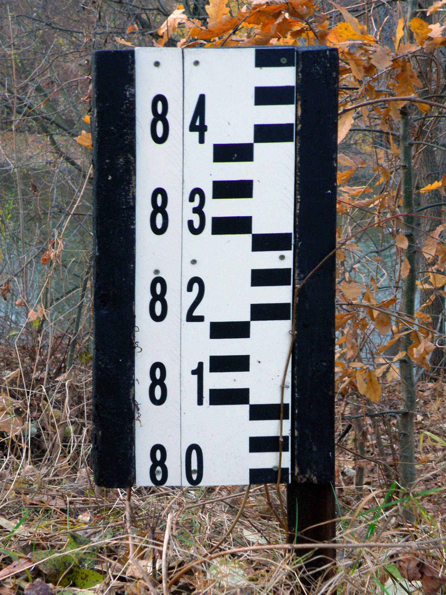 Warszawa, Port Praski - port nad Wisłą na terenie dzielnicy Praga Północ - wodowskaz.